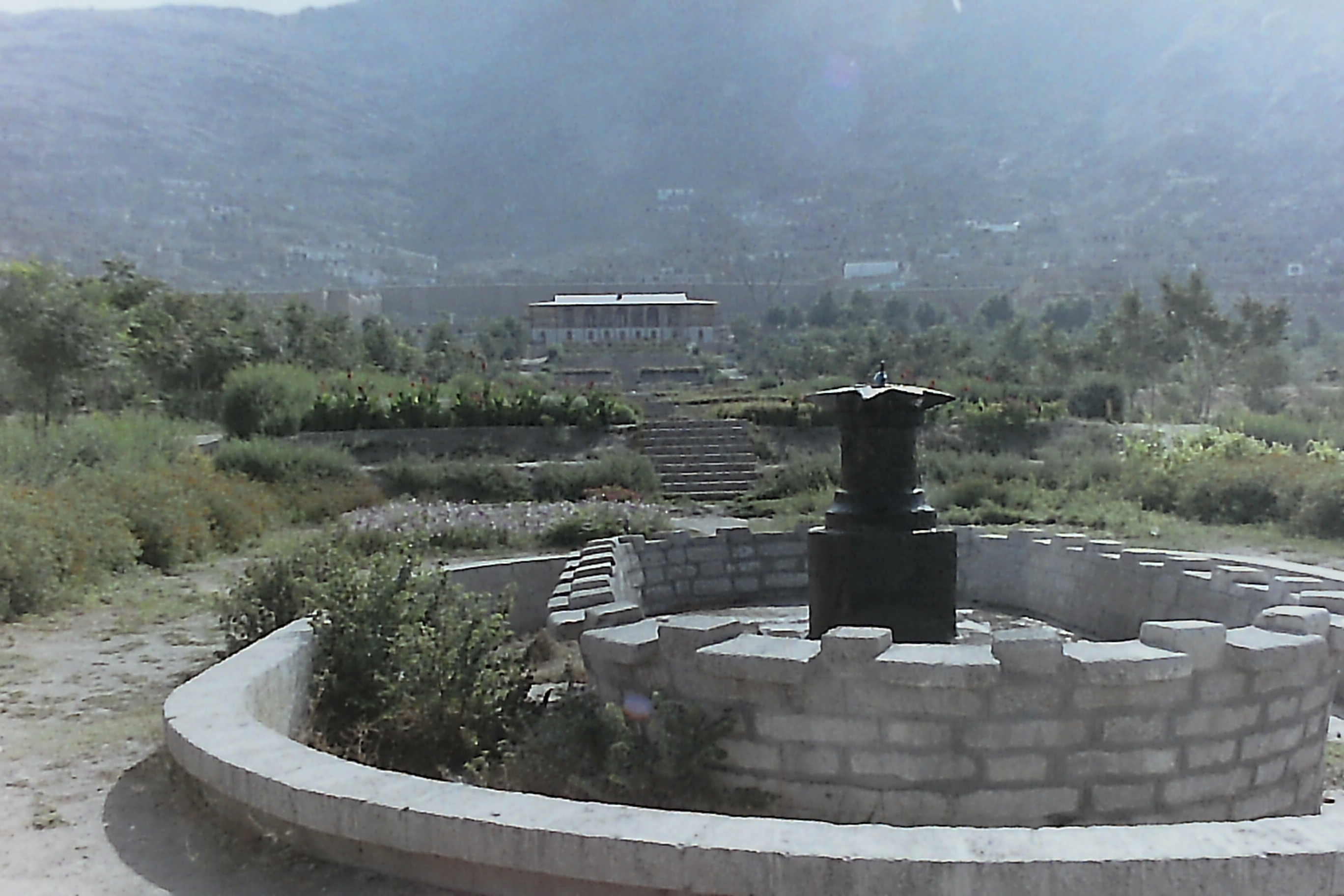 アフガニスタンの首都カブールにあるムガル帝国初代バーブルの墓がある庭園バーブル・バーグ 2003年8月に訪問した際に撮影（フィルムスキャナーでネガをデジタル画像化）